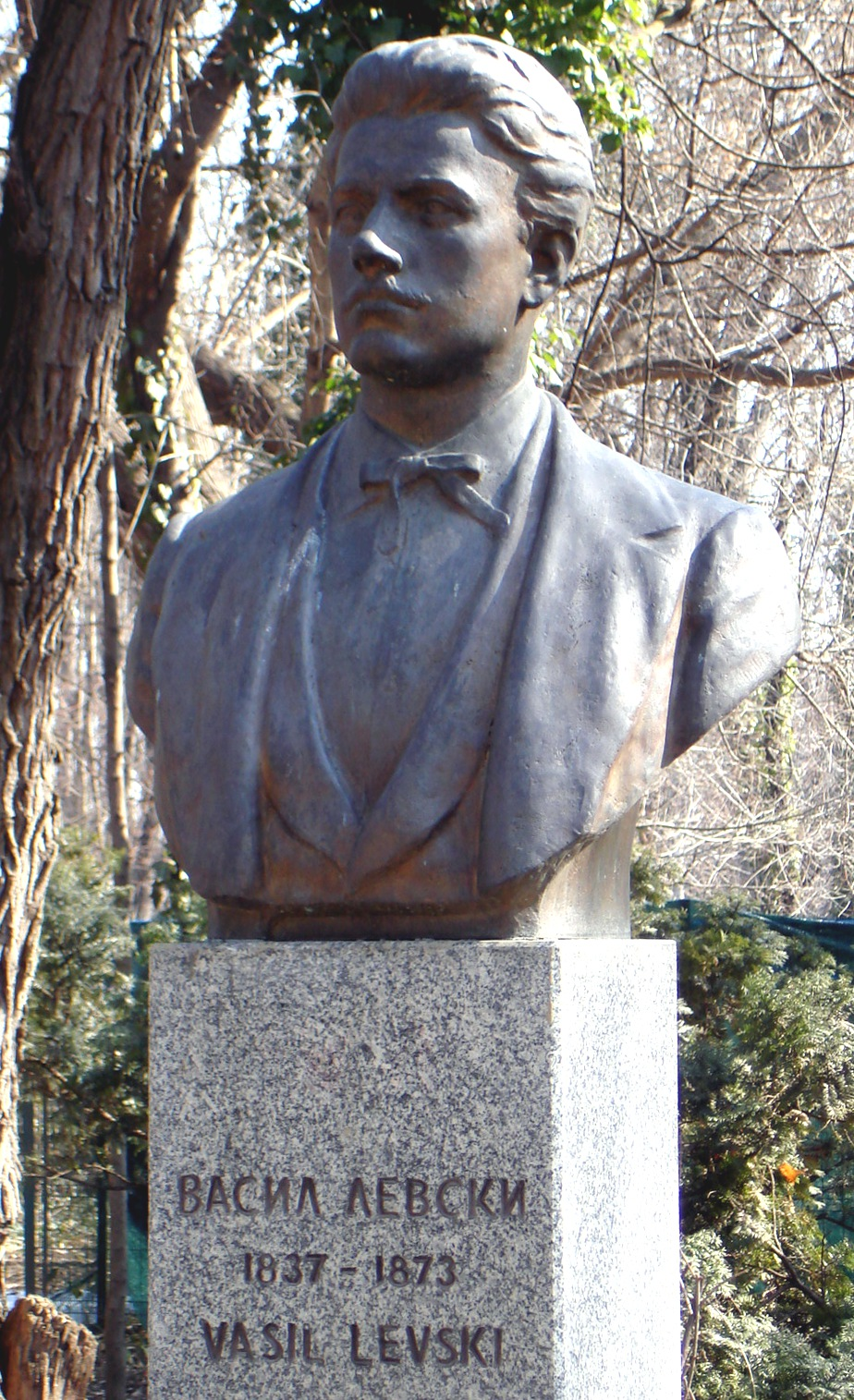 Bustul lui Vasil Levski în parcul Herăstrău din București